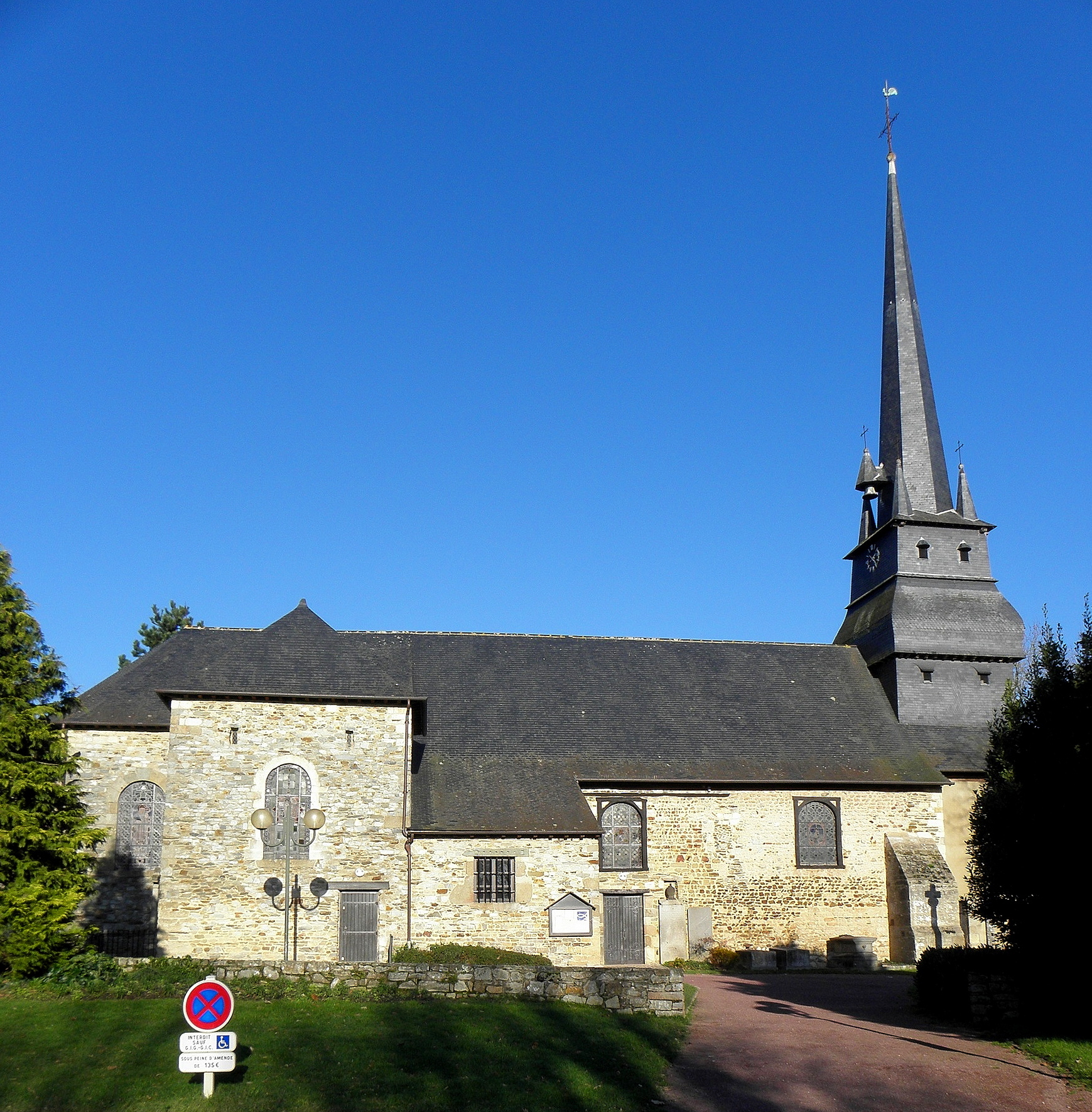 Église Saint-Grégoire, commune de Saint-Grégoire (35). Édifice désorienté au XIXe. Vue méridionale.